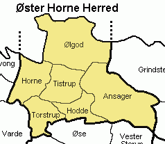 Øster Horne Herred Ribe Amt, Denmark Map by Svend-Erik Christiansen , edited by Nico-dk.